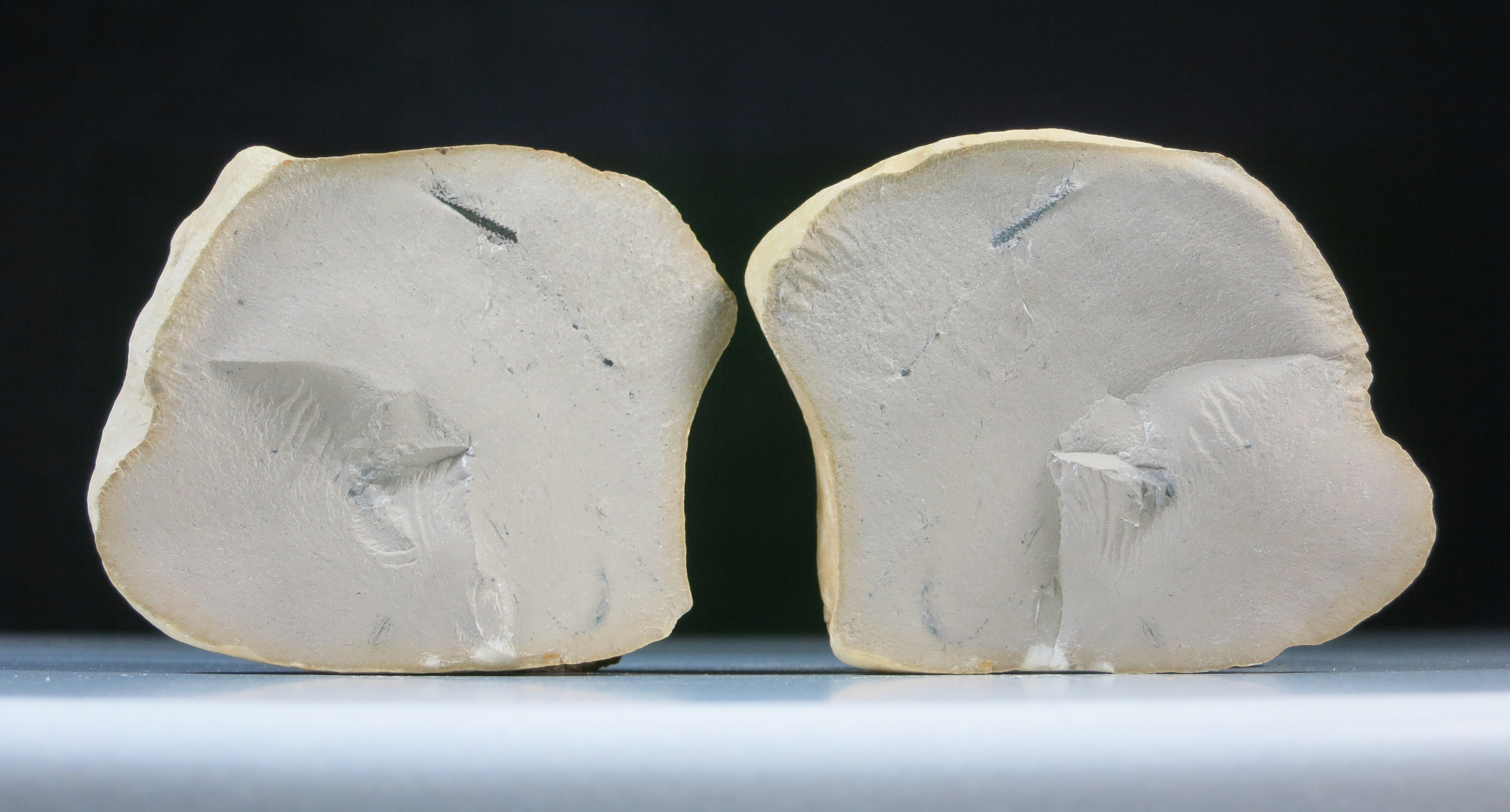 Grauer Ostsee-Kalk; Herkunft: Ostseegrund südlich der Ålandinseln; Alter: Ordovician Fundort: Kiesgrube Gusow